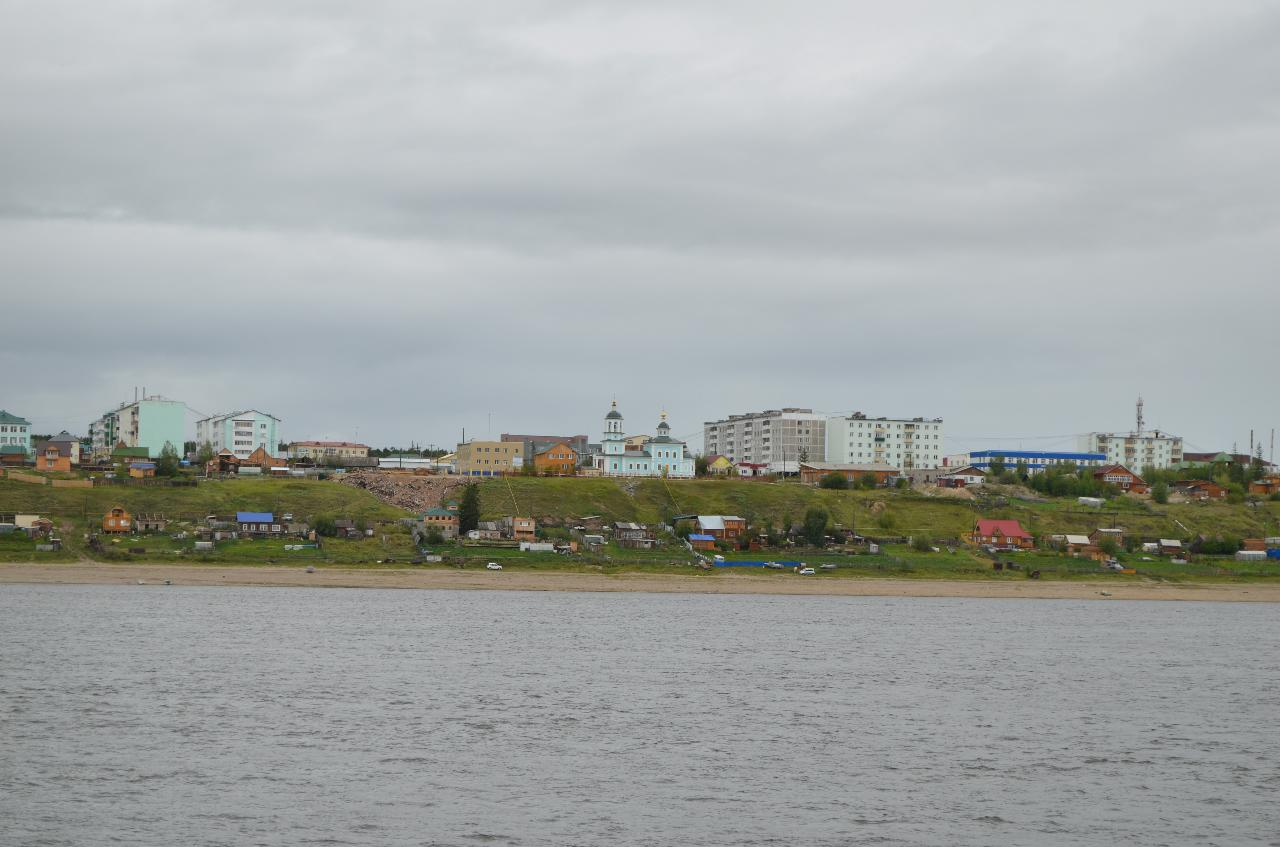 Город Покровск (Якутия) с реки